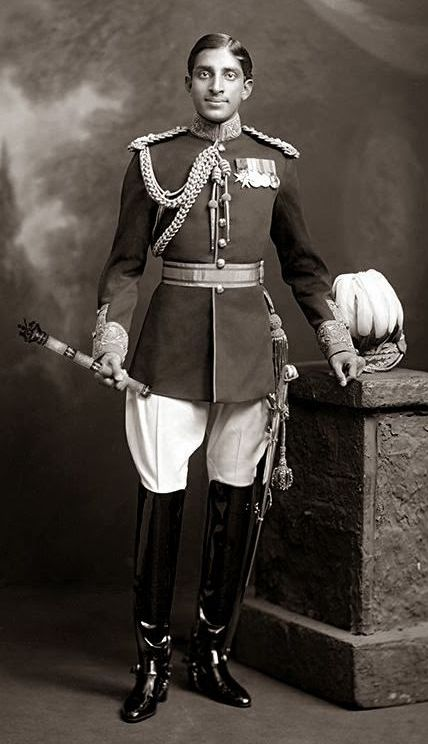 HH Tukoji Rao Holkar, Maharaja of Indore (1890-1978)